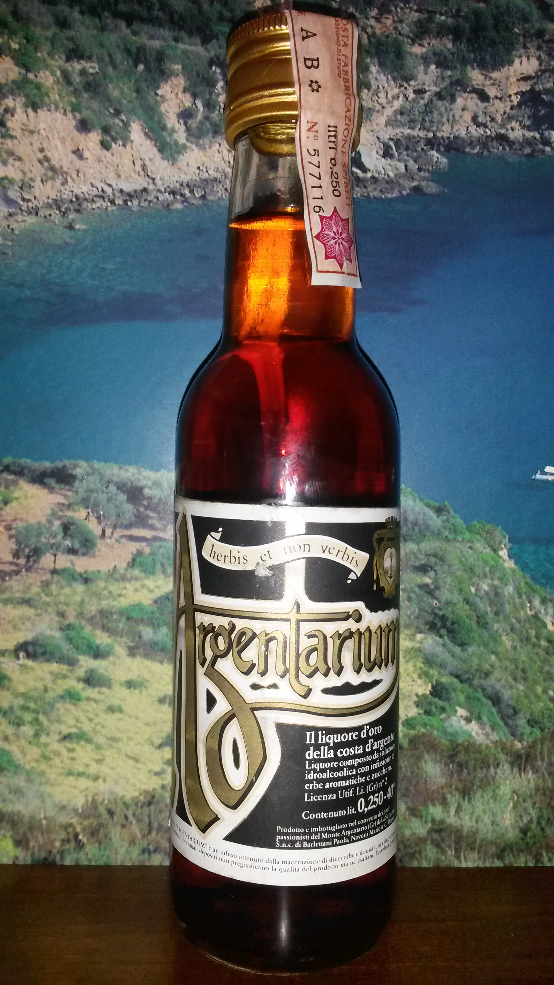 Argentarium liqueur